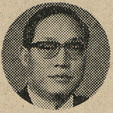 고흥문. 대한민국의 정치인